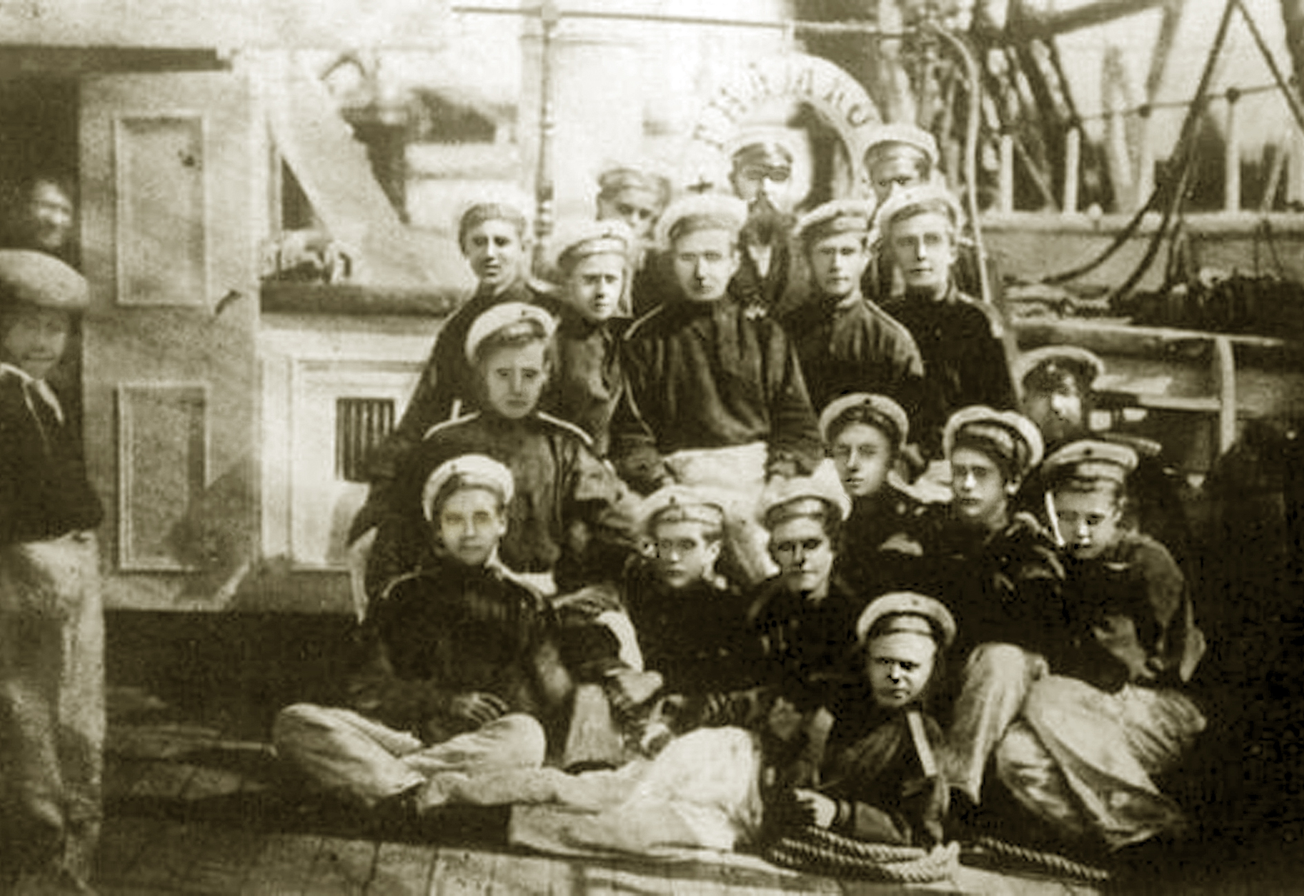 Гардемарины Императорского Морского училища (1884 г. выпуска) в учебном плавании на корвете "Гиляк". В центре Алексей Николаевич Крылов. Первым справа сидит Константин Фёдорович Шульц, рядом с ним Людвиг Бернгардович Кербер.